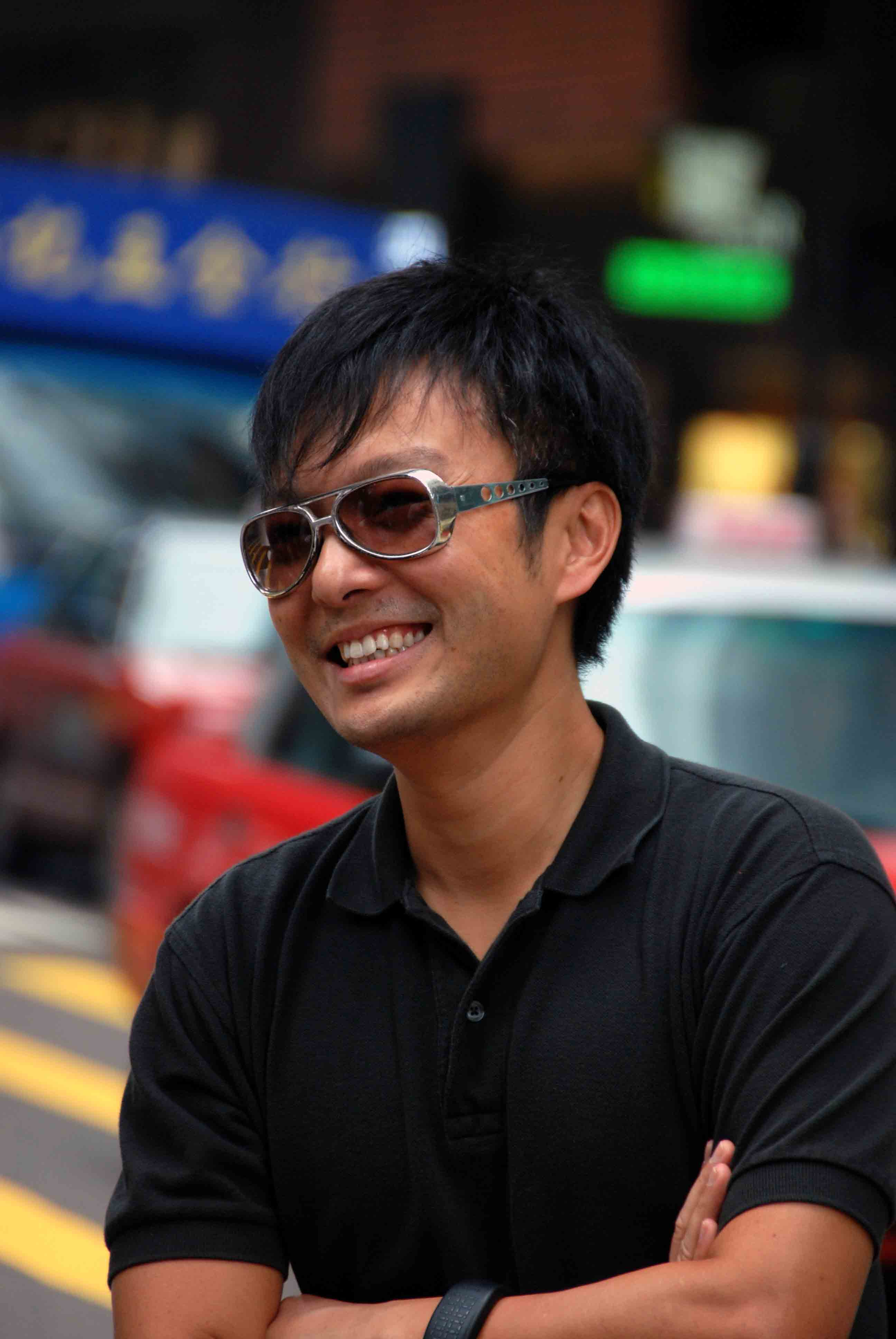 雲翔（英語名：Scud，1967年3月20日－）是一位香港電影導演。